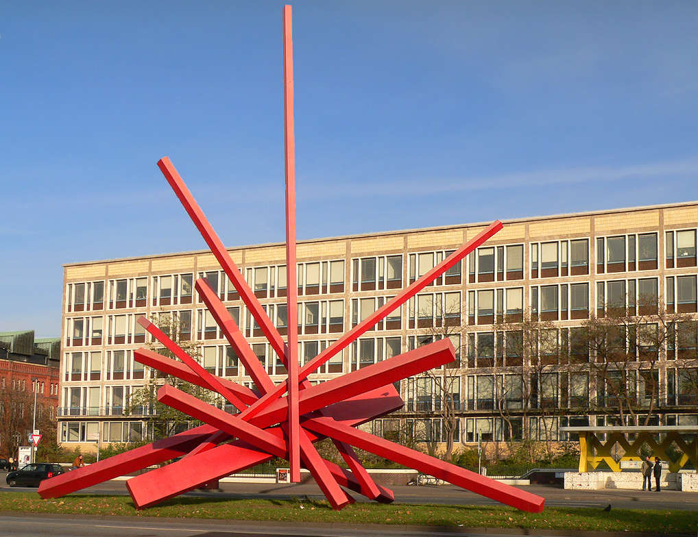 Skulptur Symphony in Red von John Henry auf der Skulpturenmeile in Hannover/Germany Foto aufgenommen von Benutzer Benutzer:Axel Hindemith, Dezember 2005